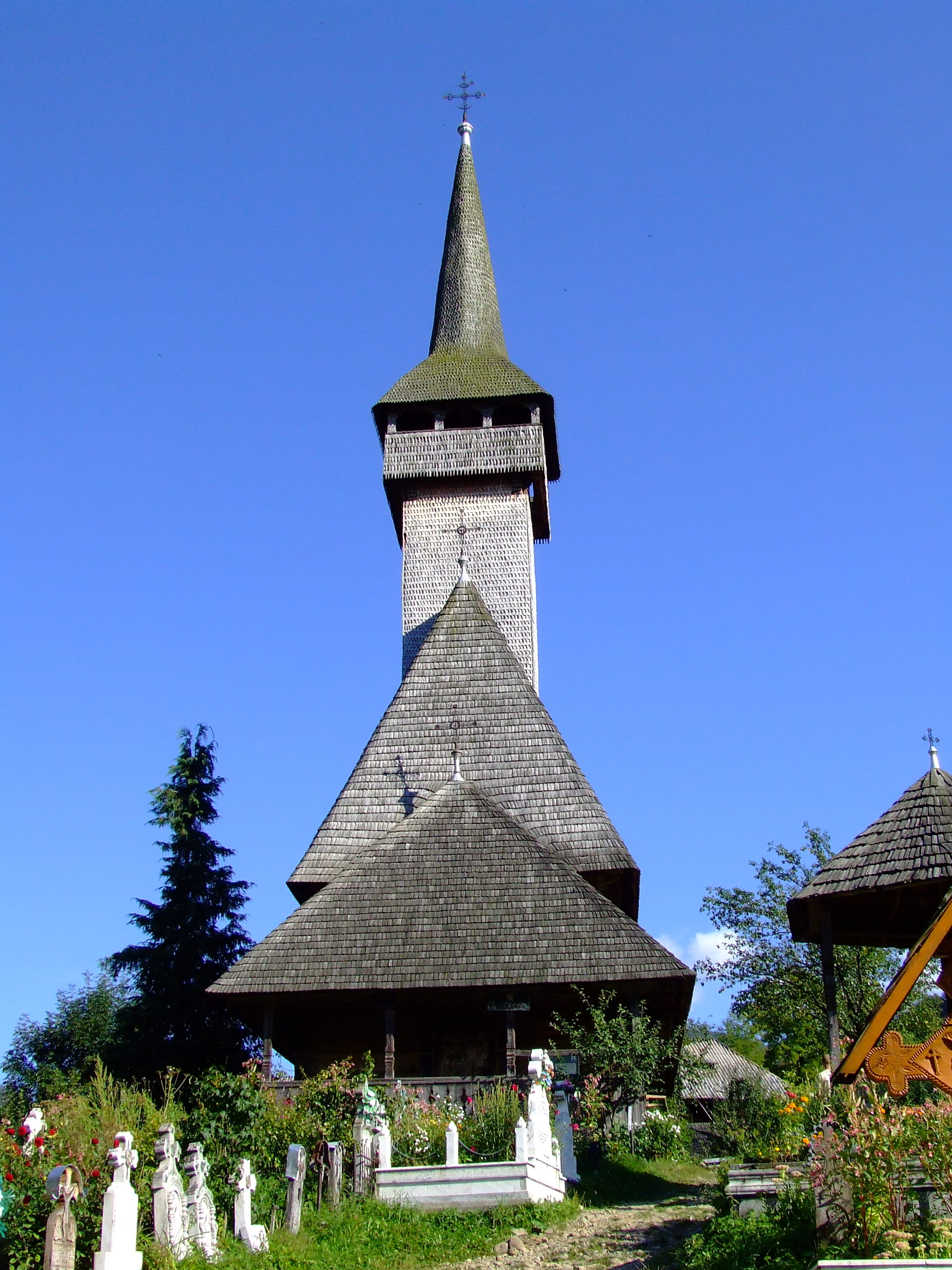 Biserica de lemn din Botiza, judeţul Maramureş.